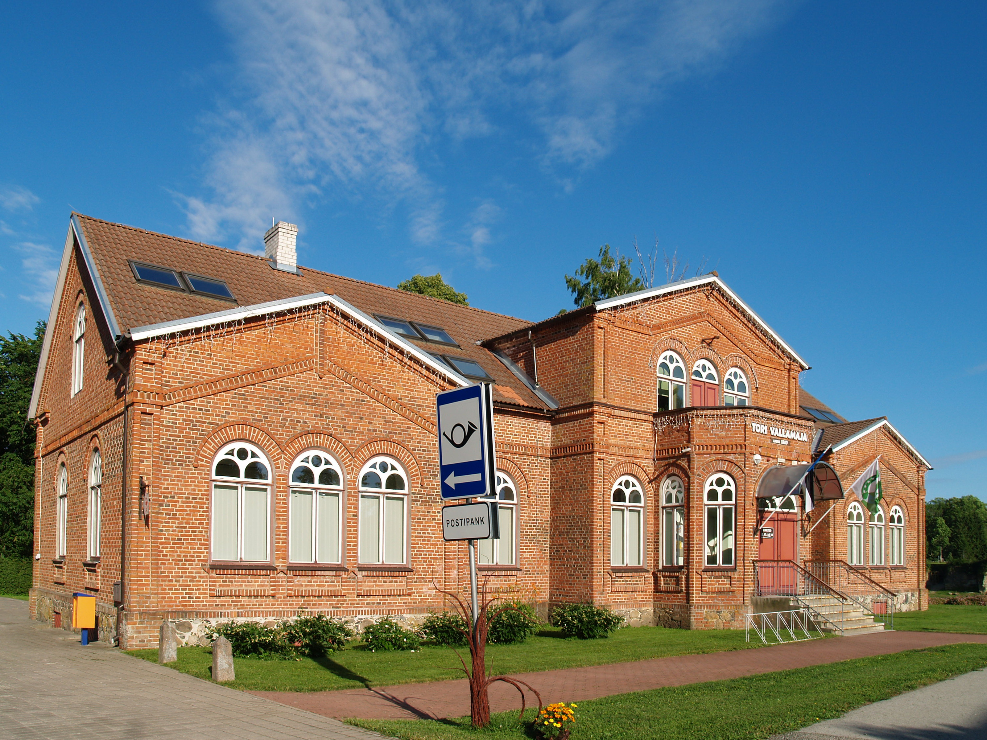 Tori uus vallamaja